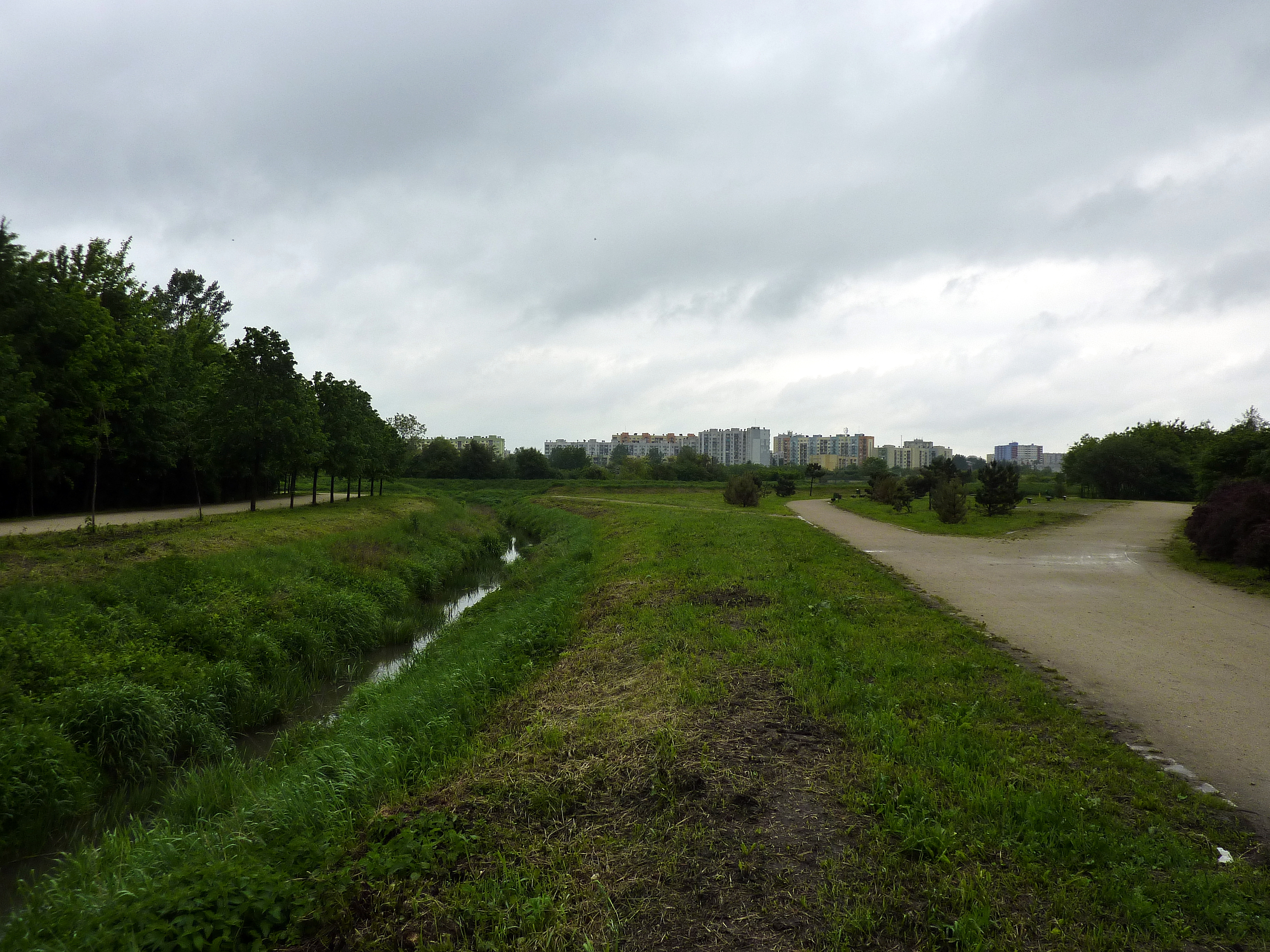 Park Tysiąclecia we Wrocławiu, w tle osiedle Nowy Dwór, z lewej strumień Kasina